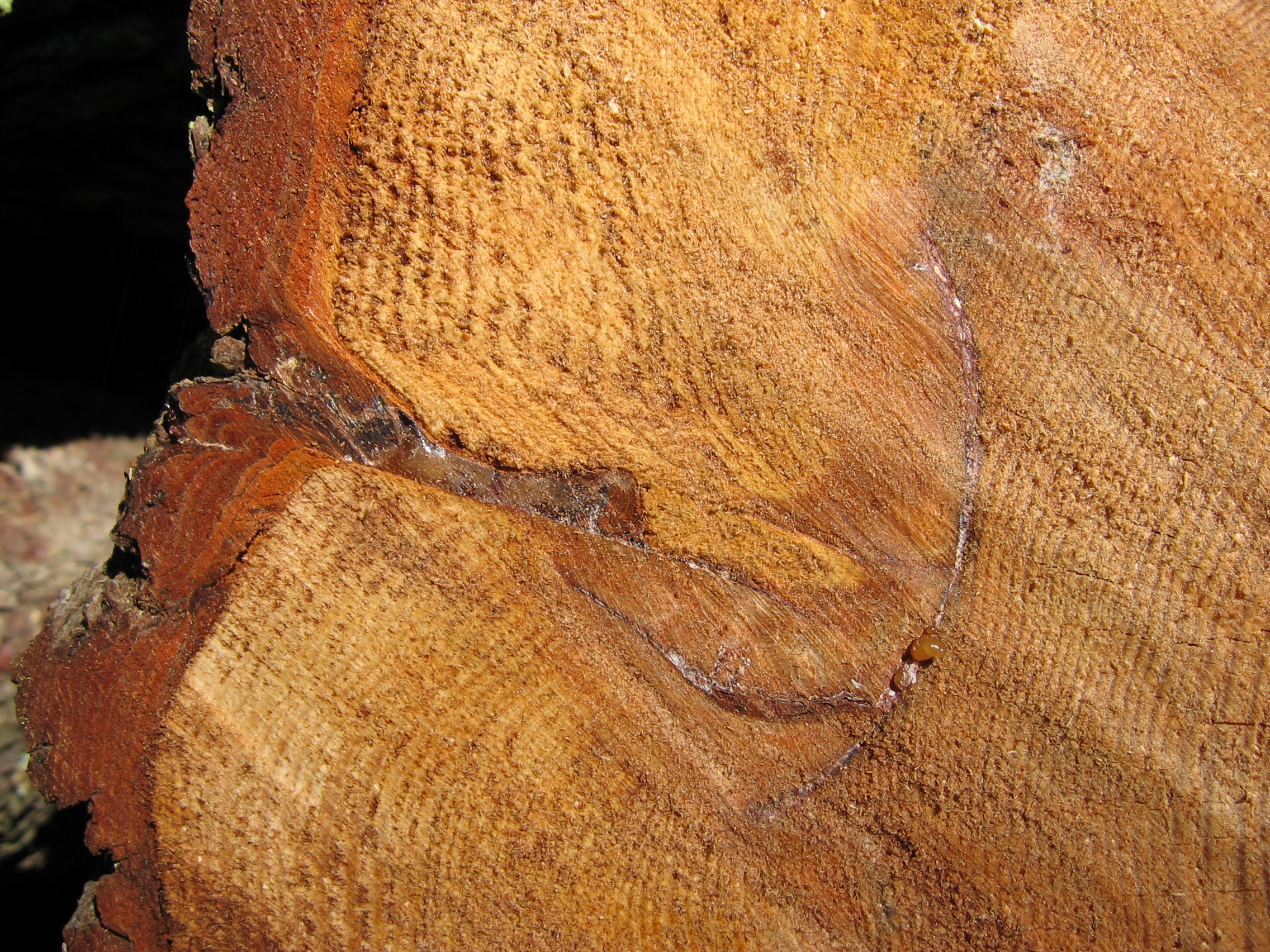 Photo d'un tronc de pin tronçonné, qui a été gemmé.